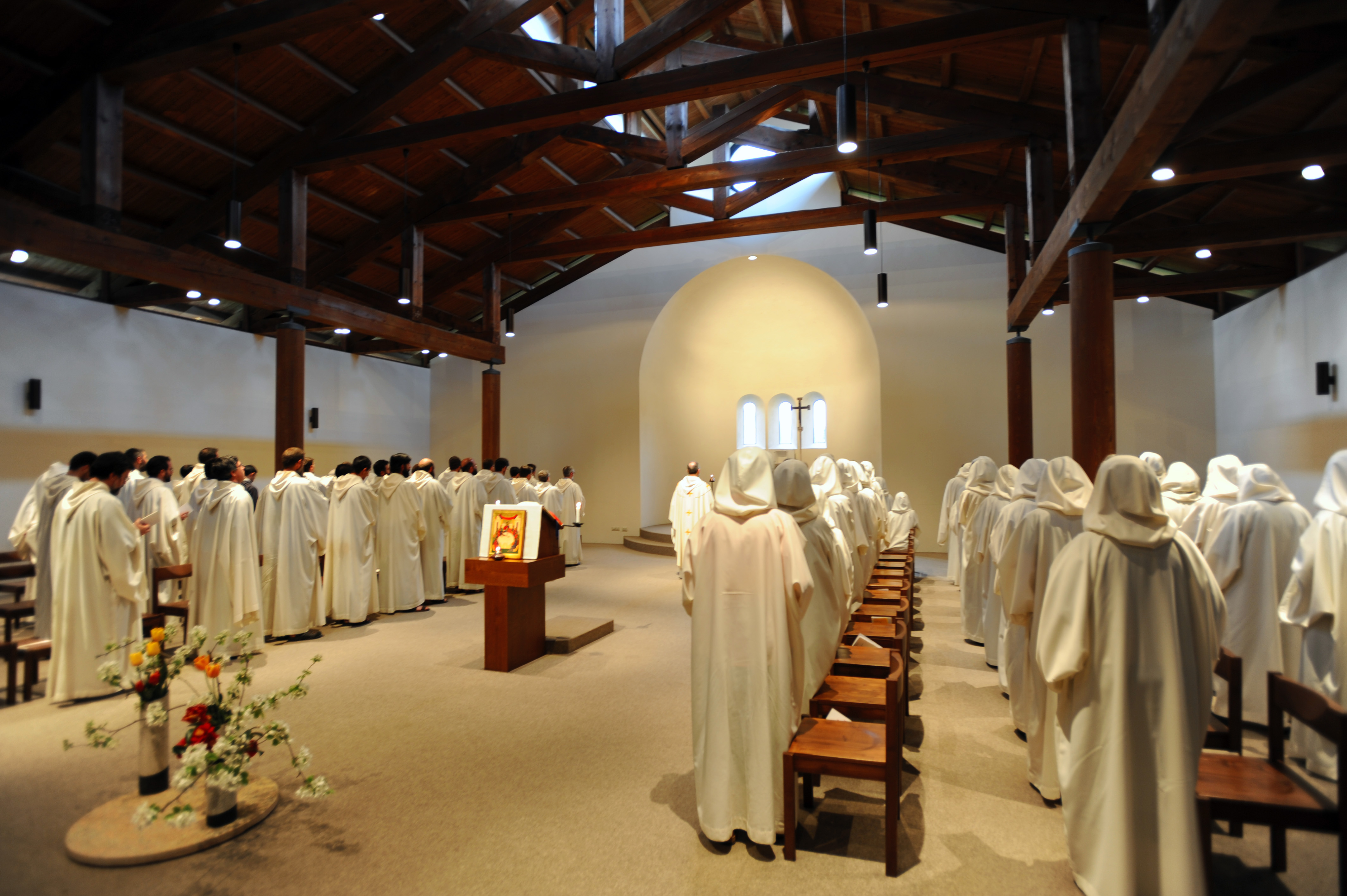 Interno della chiesa del monastero di Bose. Fratelli e sorelle pregano gi uni di frote alle altre.